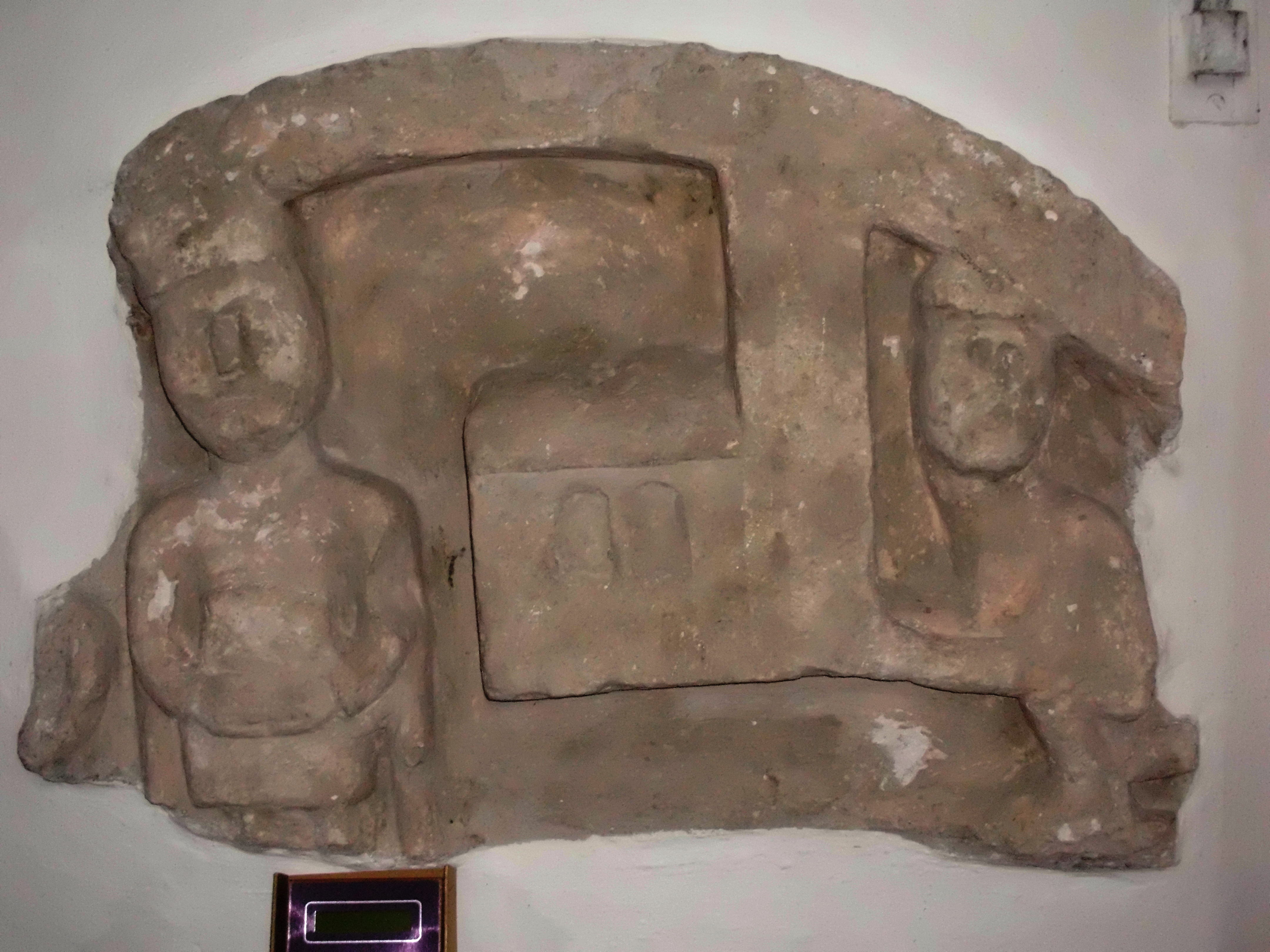 Oberdolling, Rest eines frühgotischen Tympanons in der Pfarrkirche St. Georg